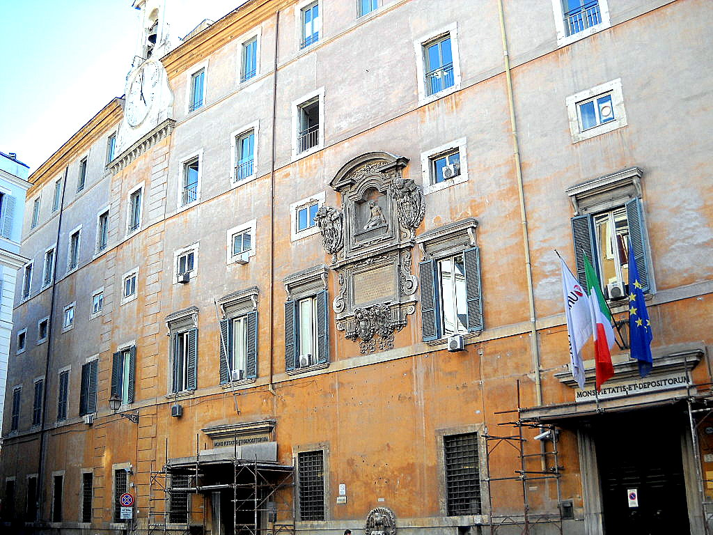 Facciata del Palazzo del Monte della Pietà nel rione Regola di Roma